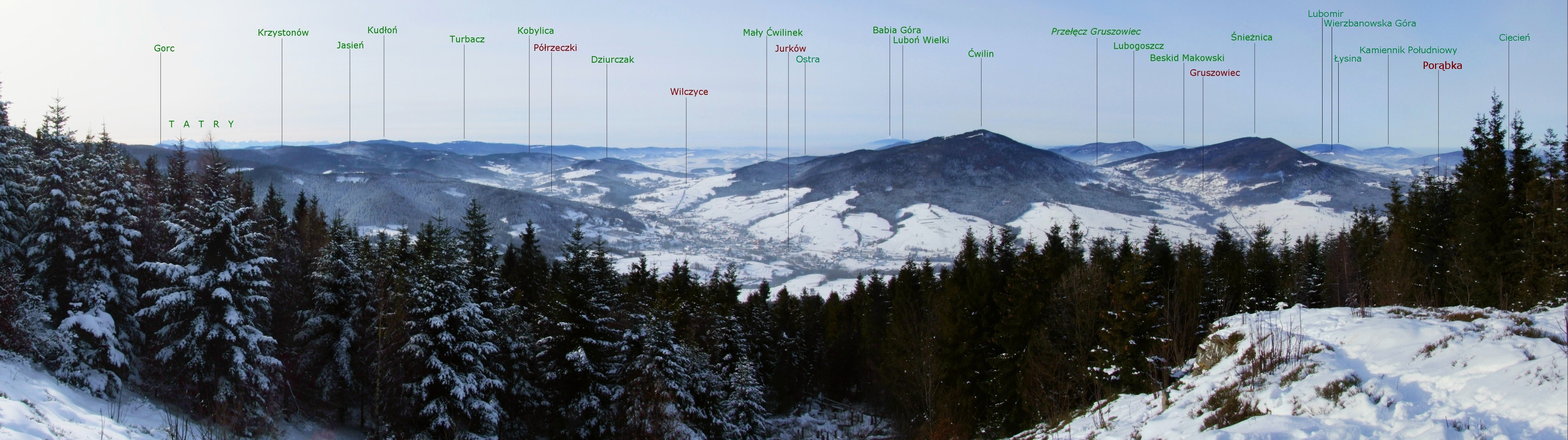 Panorama z Łopienia.